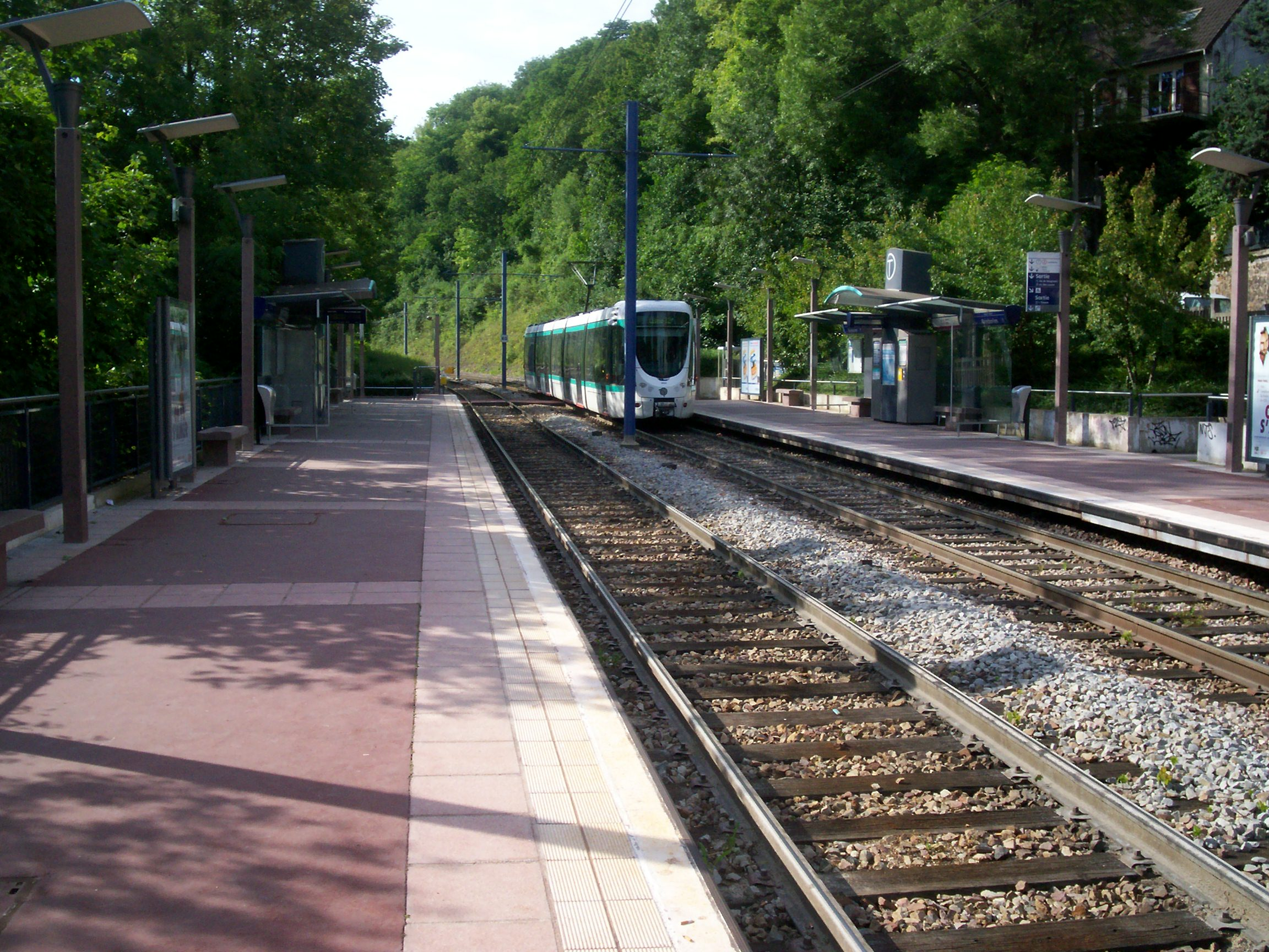 Paris Tramway T2